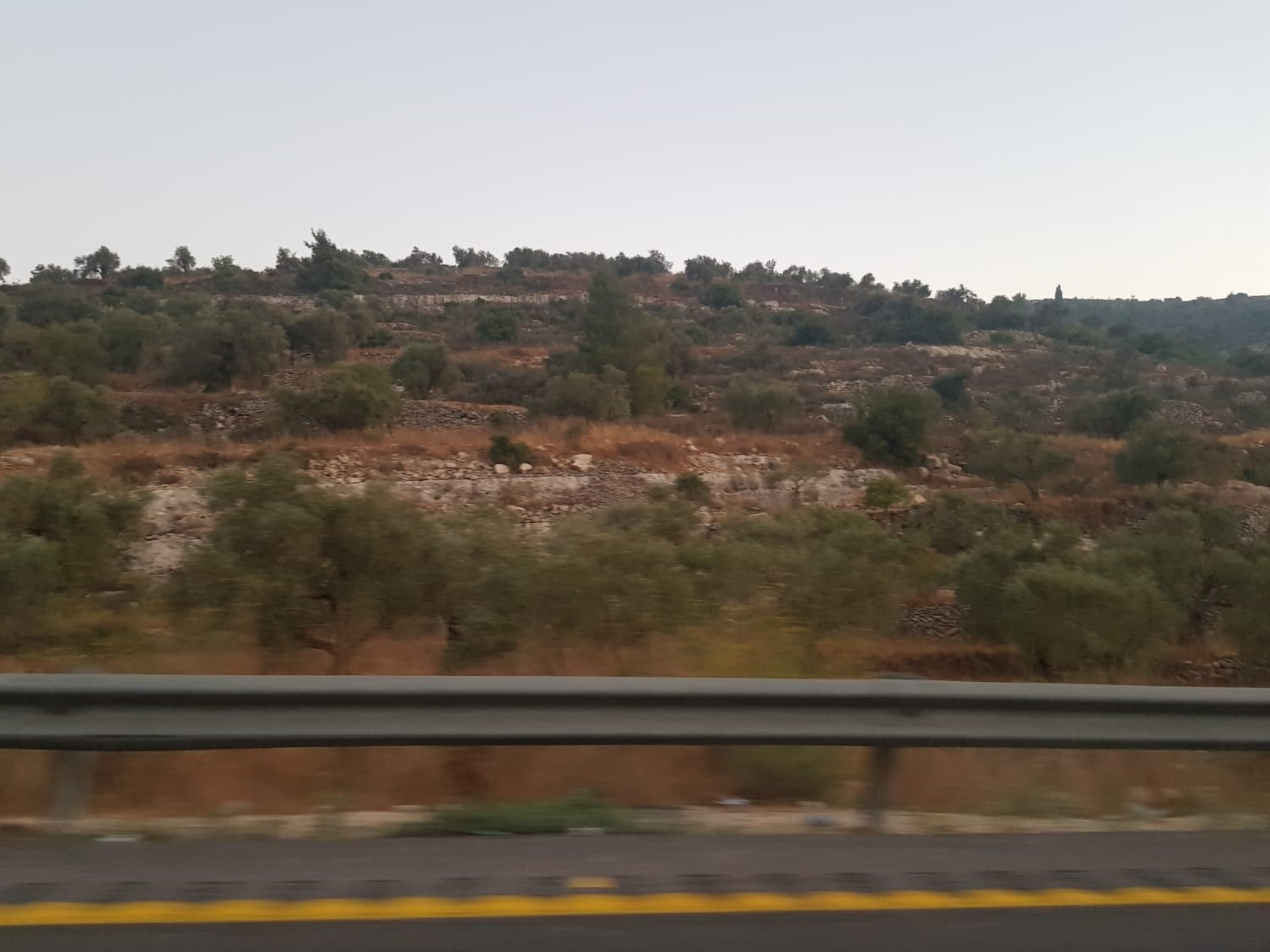 שעת ערב, הנוף המאפיין את הנוף בואדי